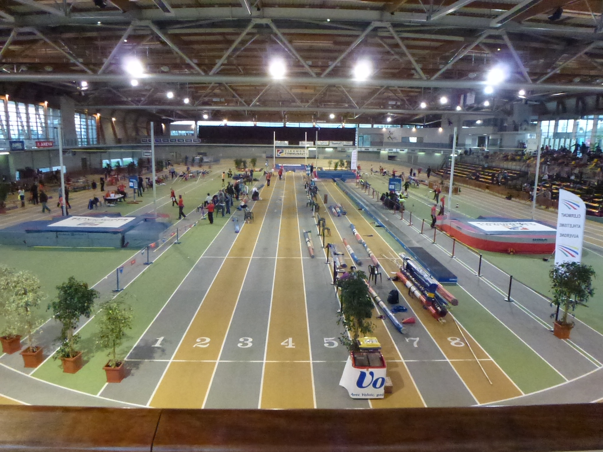 Le Stadium Jean-Pellez lors du meeting Capitale Perche 2012 le 14 janvier de cette même année.